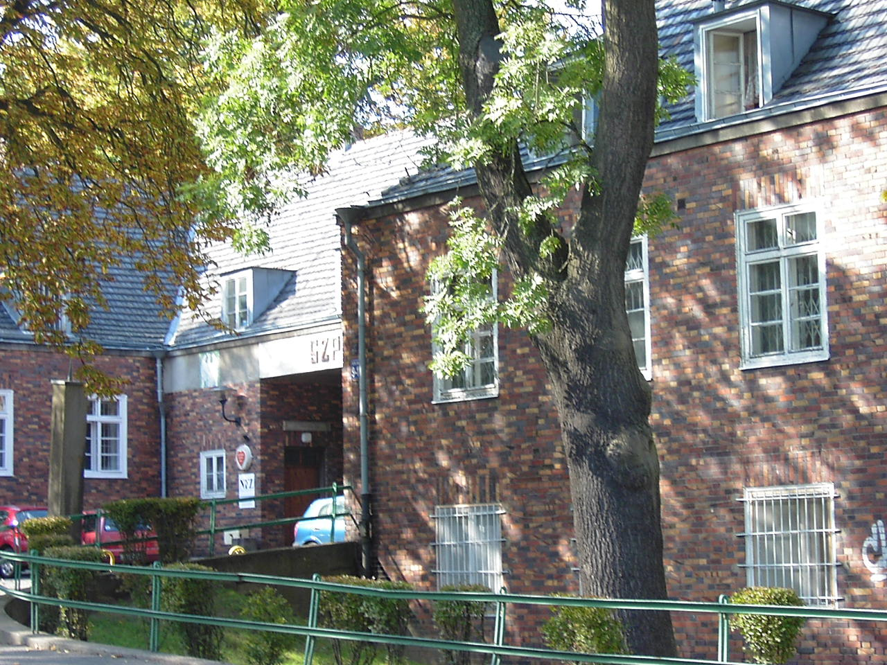 szpital wojskowy w Szczecinie (zabytek nr rejestr. 1232)